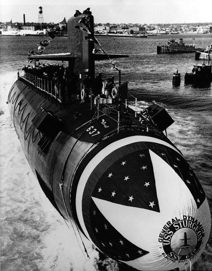 USS Sturgeon (SSN-637) Launch